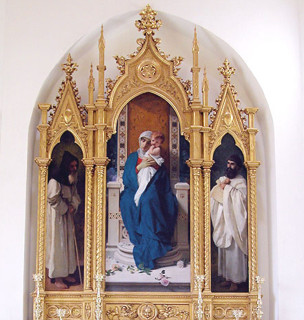 il trittico della "Madonna delle Rose con ai lati Sant'Agostino e Sant'Antonio Abate" di Domenico Morelli; tecnica: olio su tavola del 1872; commissionato dal barone Compagna per la somma di 23.000 lire